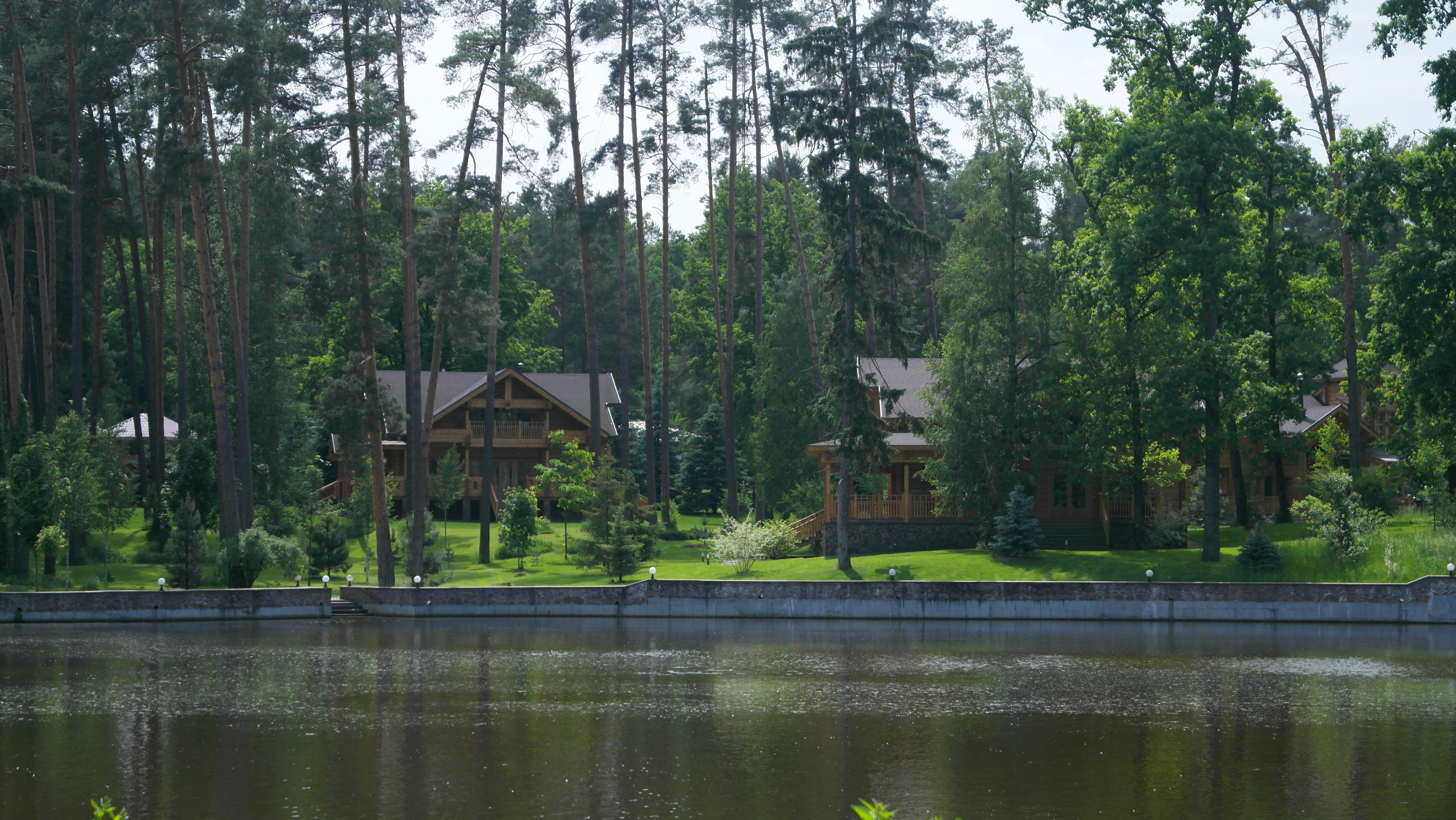 «Жуків хутір», Києво-Святошинський район, Бузівська та Михайло-Рубежівська сільські ради